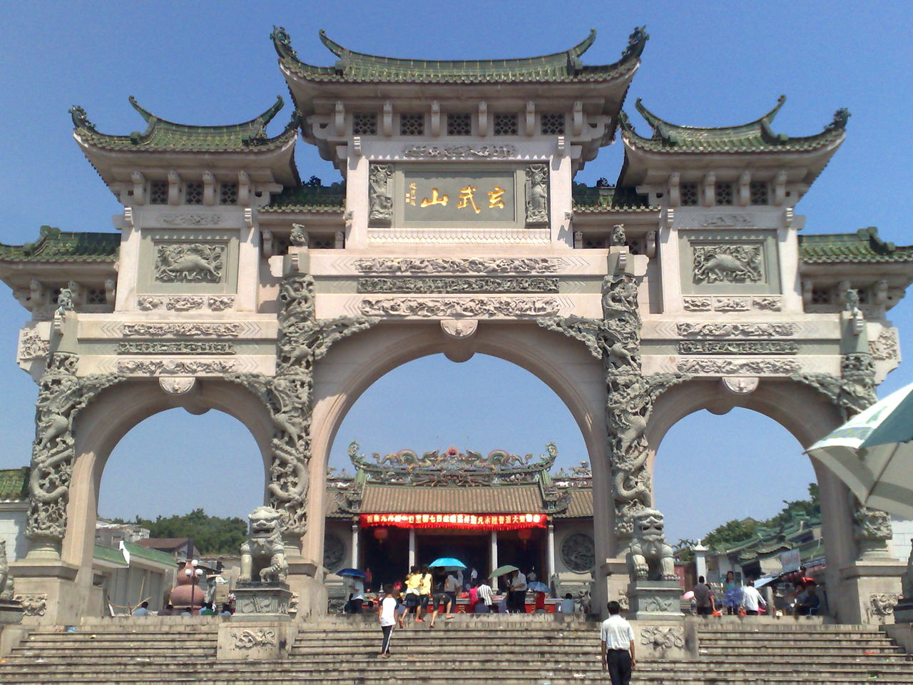 碣石镇玄武山